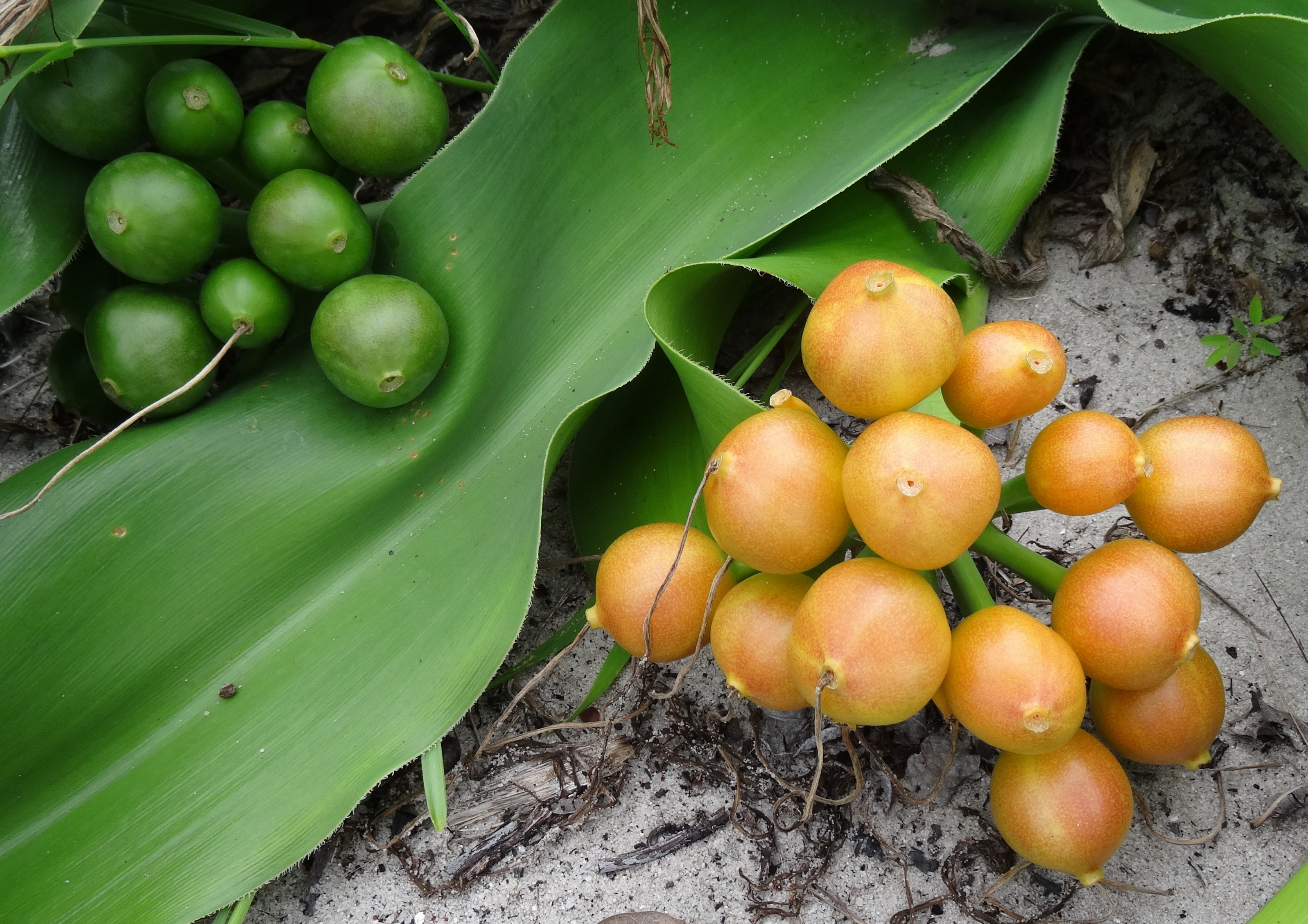 Crinum stuhlmannii - fruits